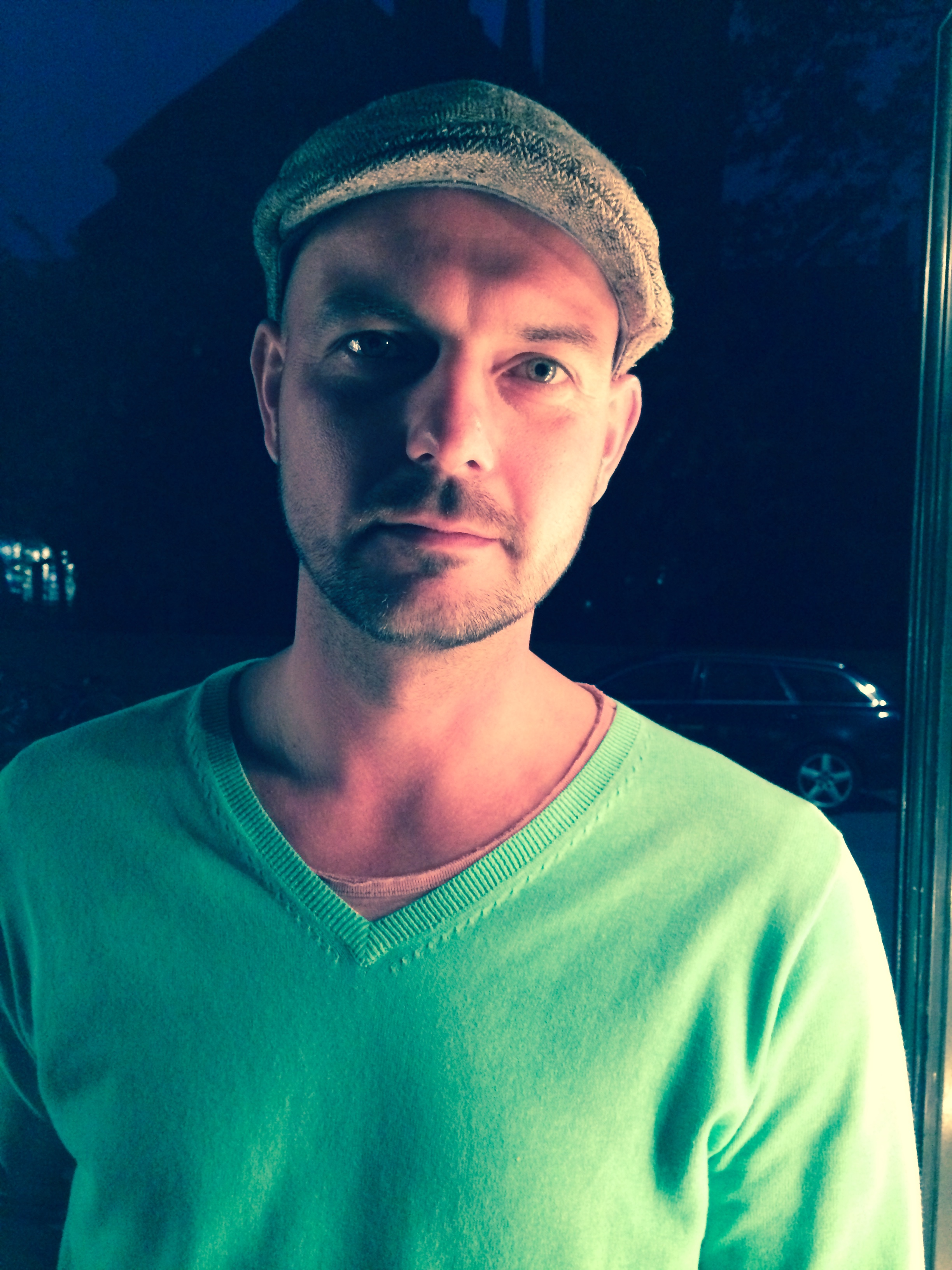 Jürgen Pettinger (2017)